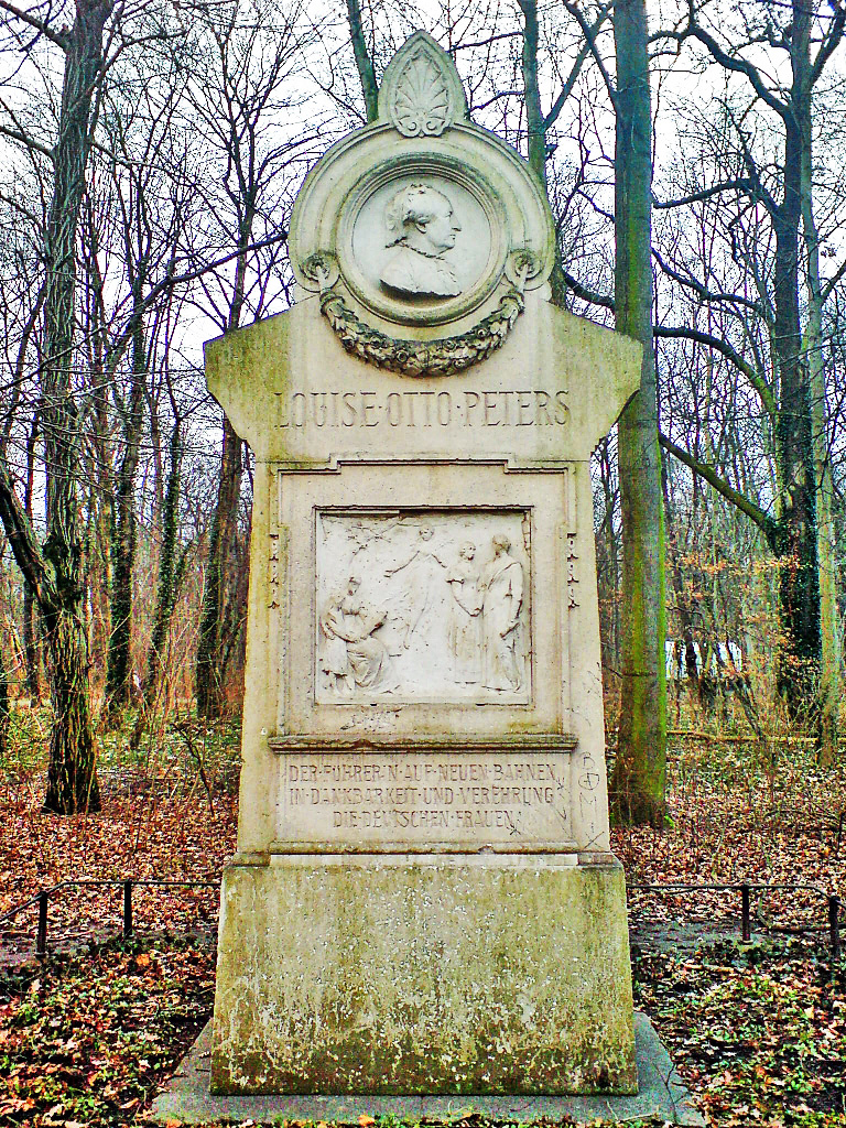 Denkmal für Louise Otto-Peters im Leipziger Rosental; Das von dem Leipziger Bildhauer Adolf Lehnert geschaffene Denkmal wurde 1900 in den Anlagen des Alten Johannisfriedhofs eingeweiht und 1925 wegen des Baus des Neuen Grassimuseums in das Rosental versetzt.